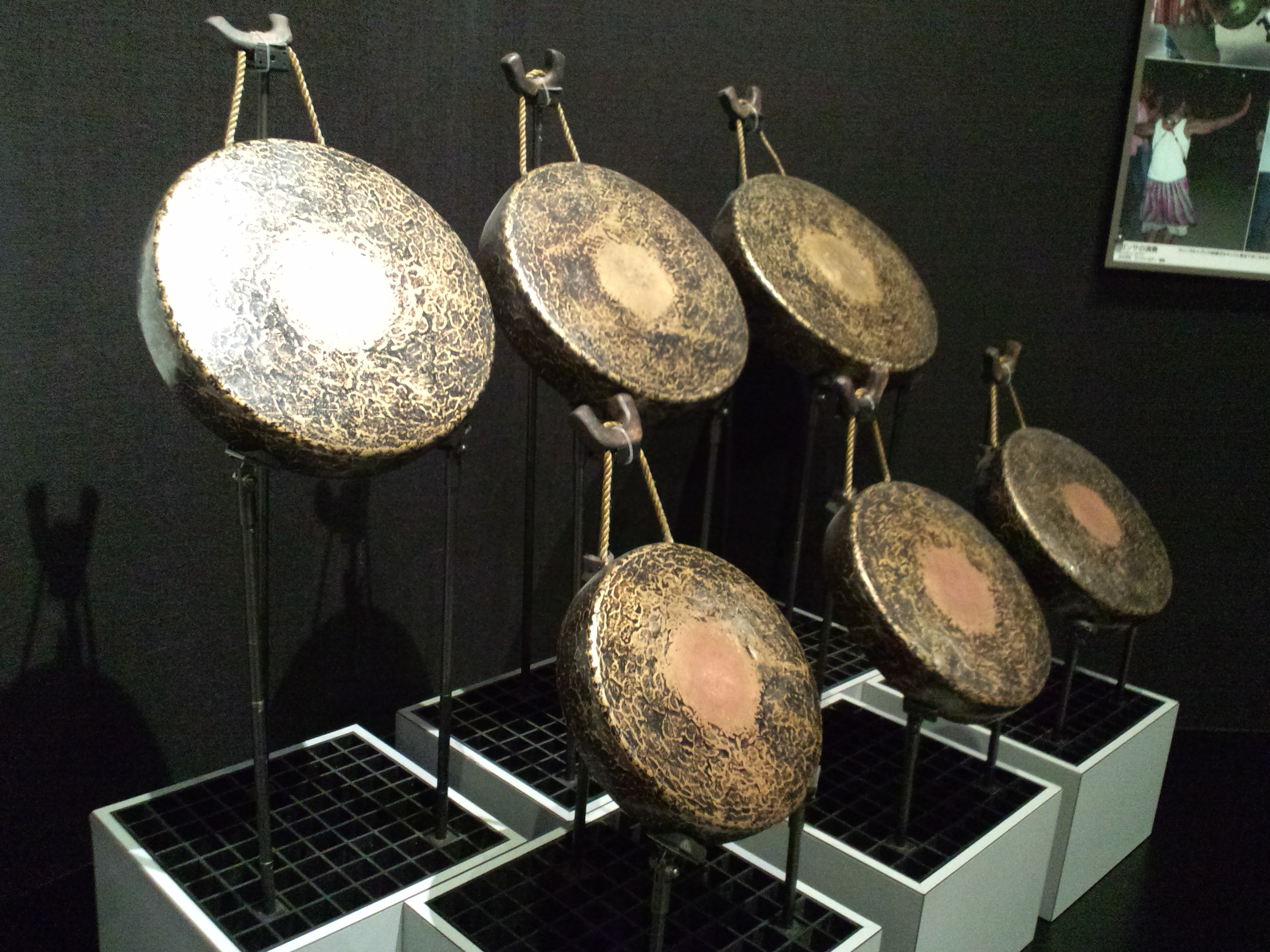 国立民族学博物館（大阪） ガンサ（フィリピン、カリンガ族、2008年収集）